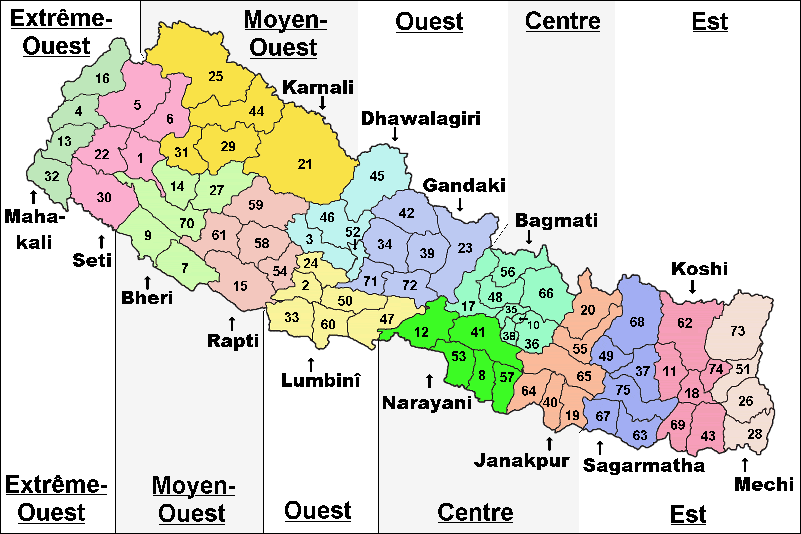 FrenchCarte des subdivisions du Népal (wp-FR) : 5 régions de développement, 14 zones et 75 districts. Noms des régions en français. EnglishMap of subdivisions of Nepal: 5 development regions, 14 zones and 75 districts. Regions names in French.